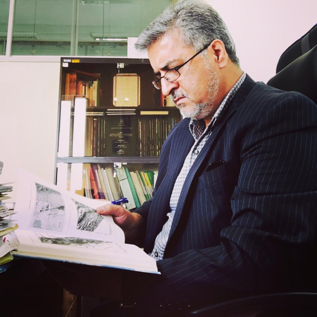 تغییر عکس